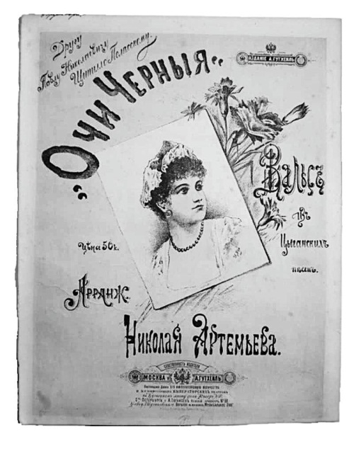 Одно из первых нотных изданий романса «Очи черные». Россия, конец XIX века.